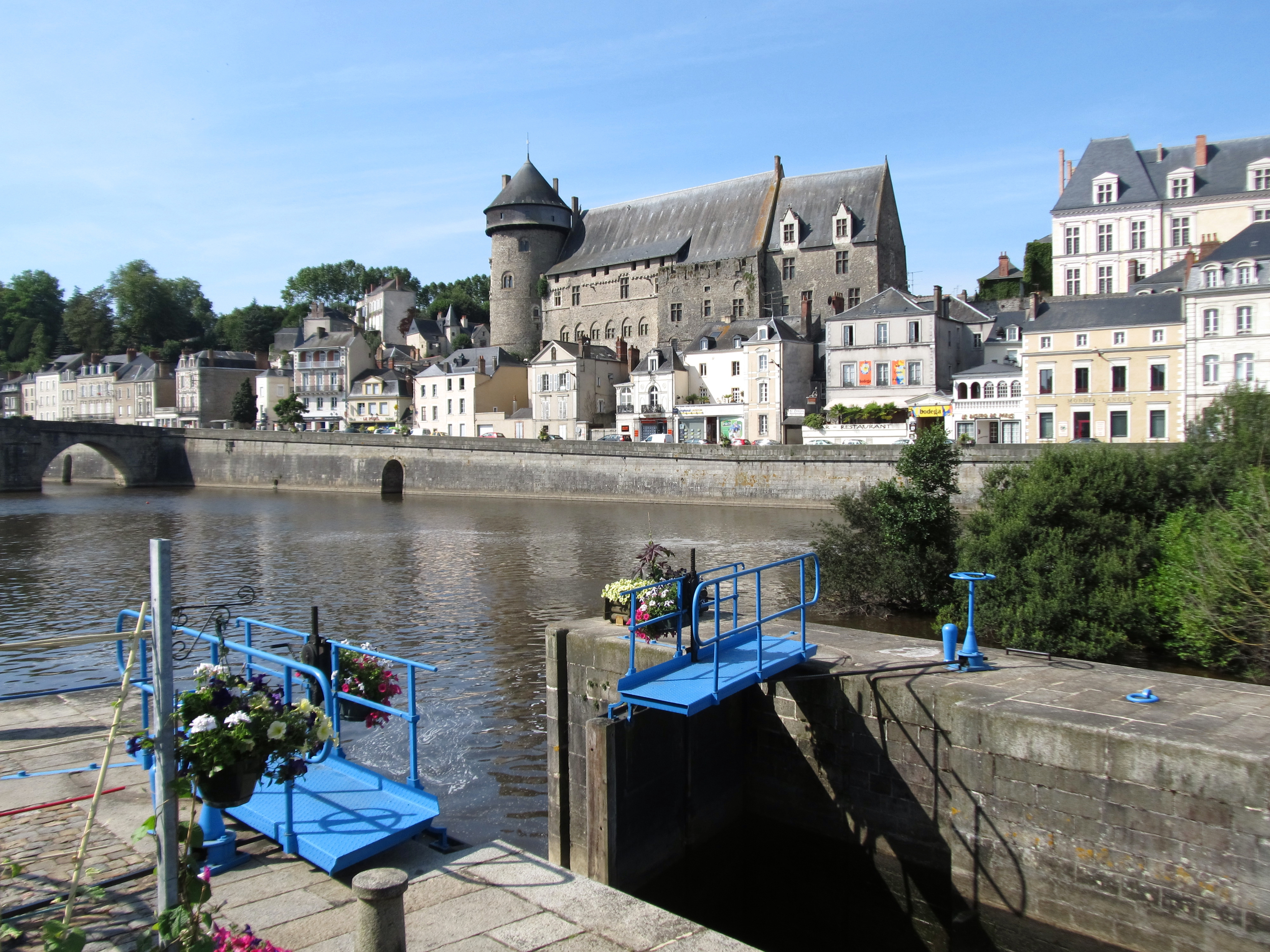 Ecluse de Laval, Mayenne, France.